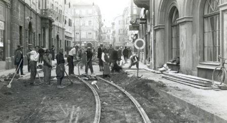 Bolzano, binario tranviario in via Mostra